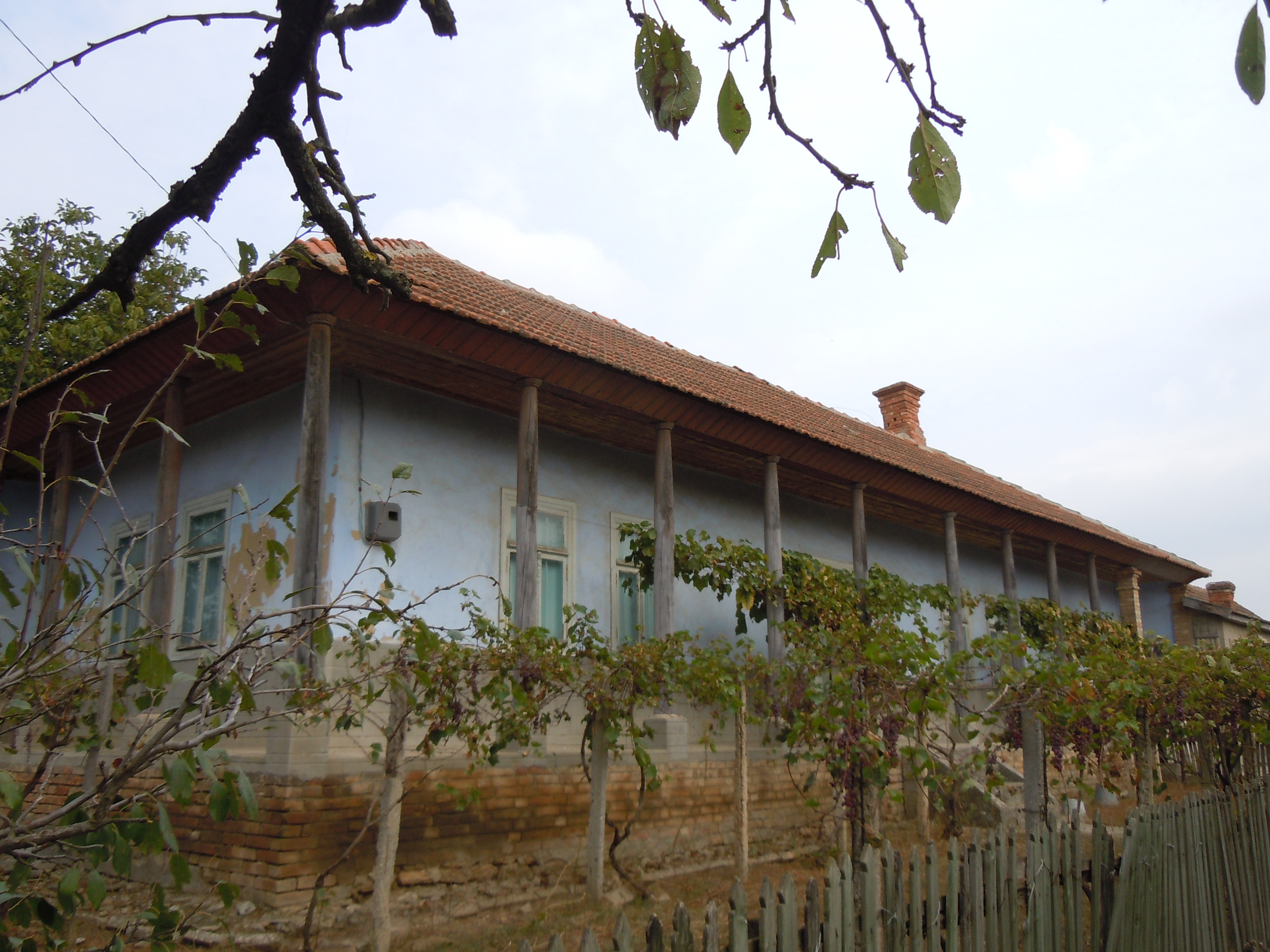 Типова албанська хата в селі Каракурт, Болградський район, Одеська область